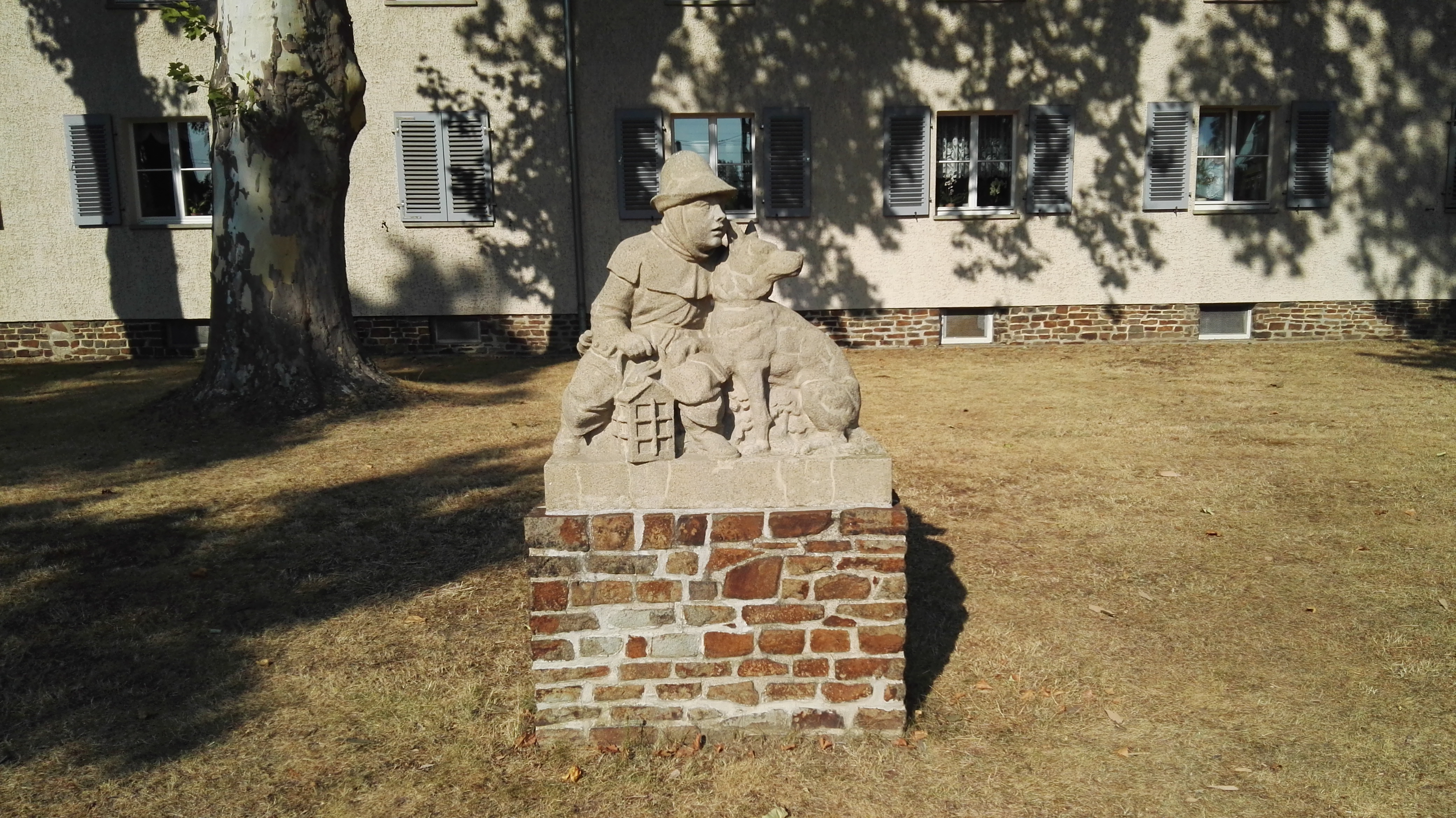 Plastik Nachtwächter mit Laterne und Hund von H. Viehweg von 1937 in Tolkewitz vor der Österreicher Straße 1-1e